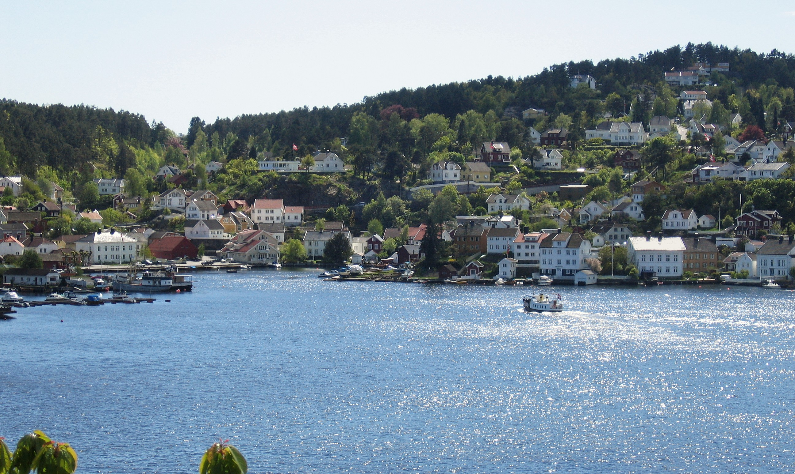 Bydelen Kolbjørnsvik i Arendal